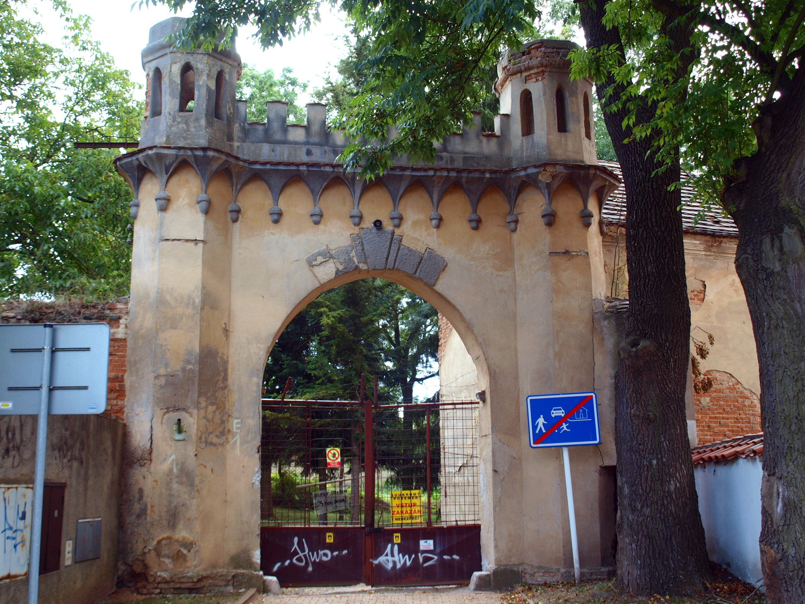 Praha-Petrovice zámek